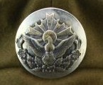 保安隊 保安士補、及び保査正帽章